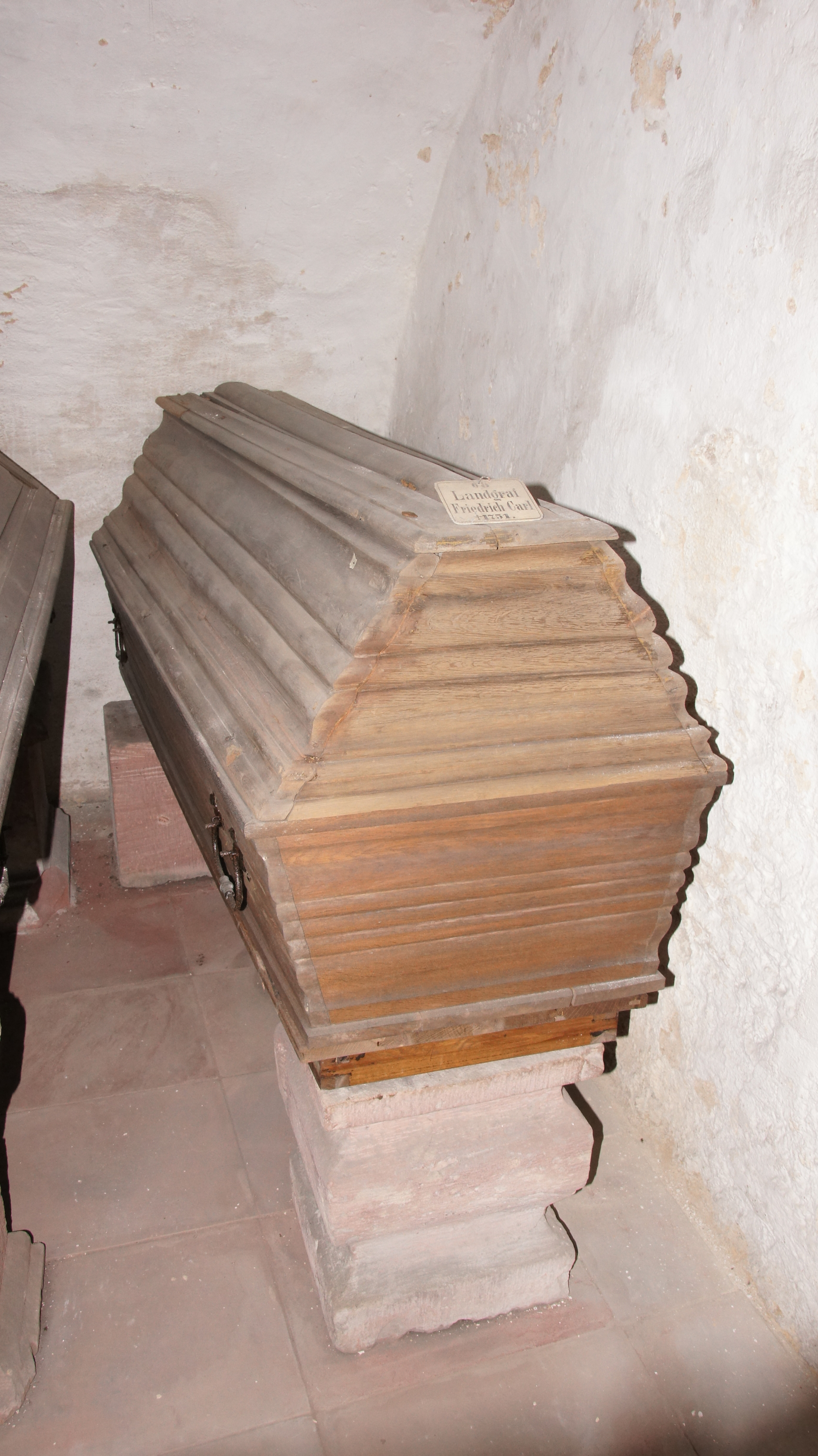 Bad Homburg vor der Höhe, Schloss, Gruft, Landgraf Friedrich IV